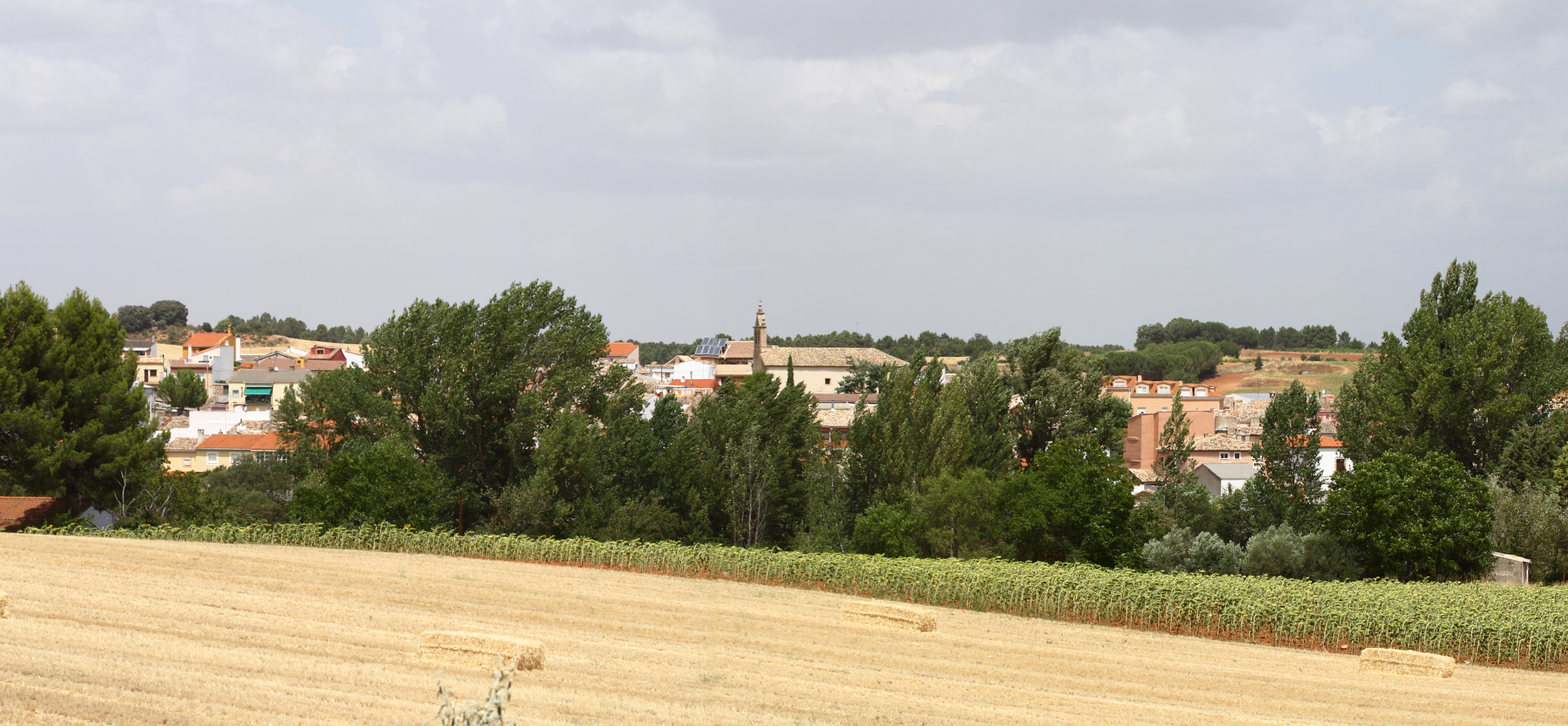 Jábaga, de Fuentenava de Jábaga, panorámica de la población